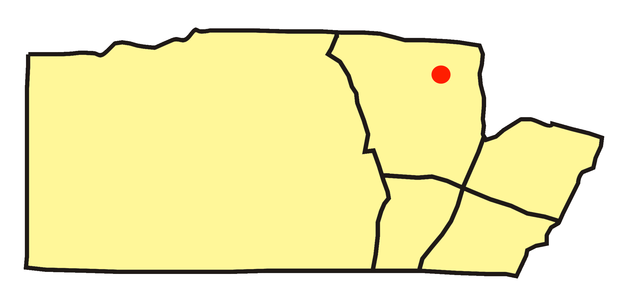 Godoy Cruz Department, Mendoza, Argentina.